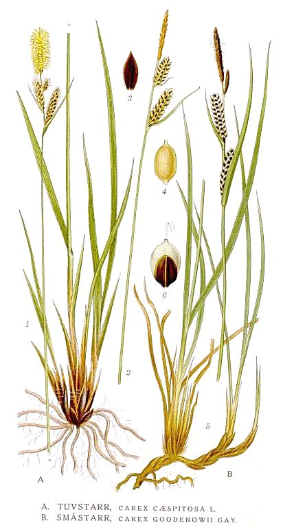 A. Carex cespitosa L. B. Carex nigra subsp. nigra, syn. Carex goodenowii J.Gay Original Description A. Tuvstarr, Carex caespitosa L. B. Småstarr, Carex goodenowii Gay.